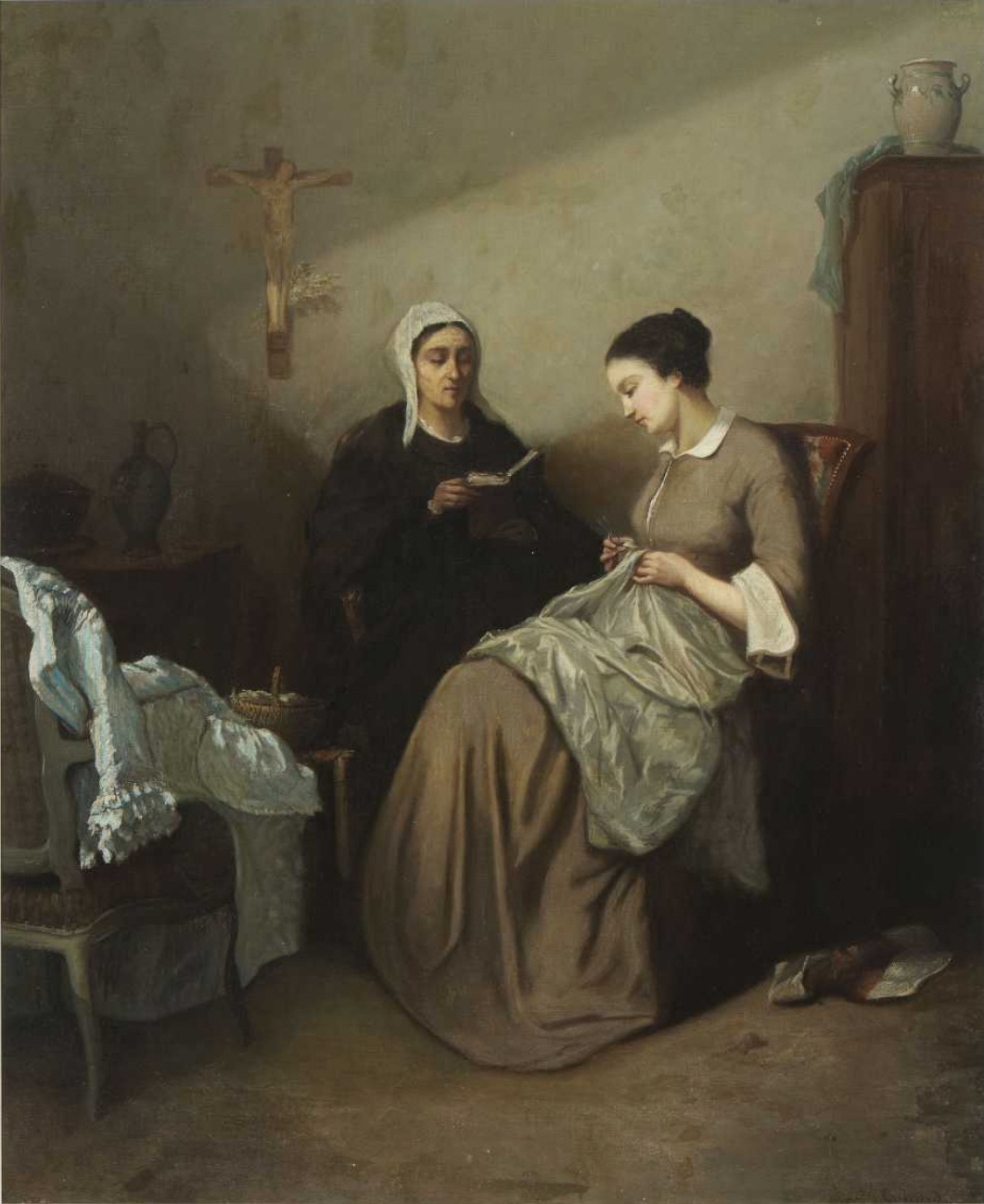 Bibelstunde. Öl auf Leinwand, 71 x 57 cm